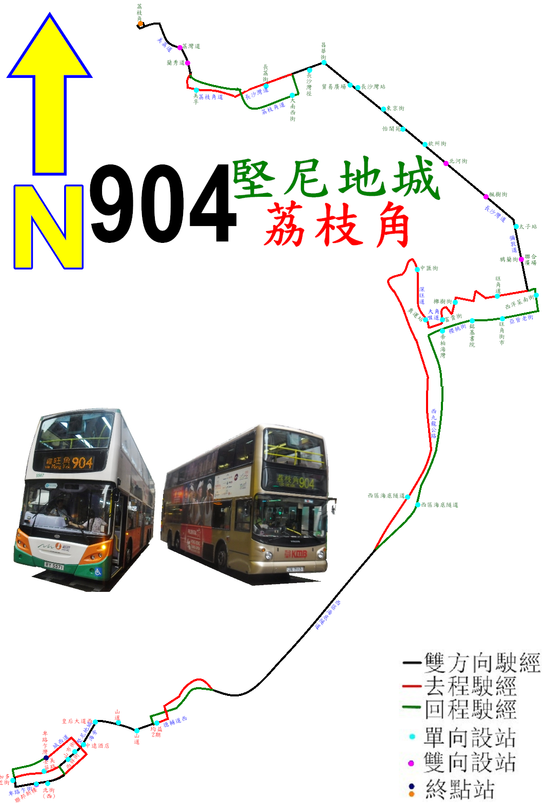 中文（香港）: 過海隧巴904線的走線圖